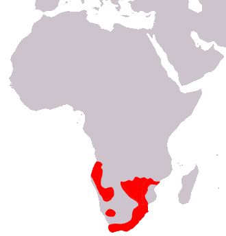 Carte de répartition du chacma (Papio ursinus)